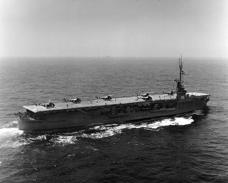 ehemaliger Geleitträger "USS Badoeng Strait" vor Korea 1954